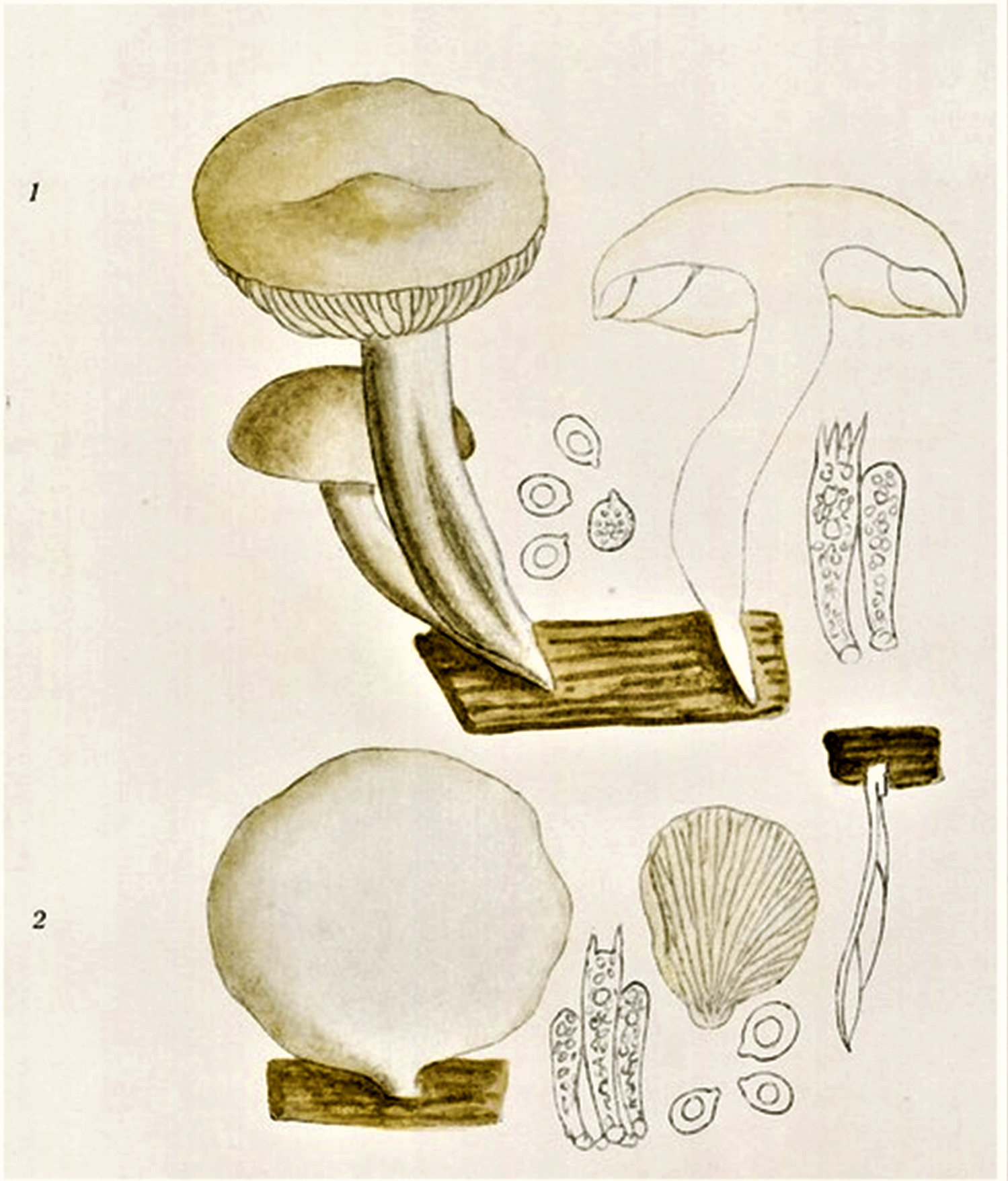 Giacomo Bresadola: 1. Pleurotus ulmarius (Bull., 1791 ex P.Kumm. (1871), heute Hypsizygus ulmarius Bull. ex Redhead (1984); 2. Pleurotus porrigens (Pers.) ex P.Kumm. (1871), heute Pleurocybella porrigens Pers. ex Singer (1947)